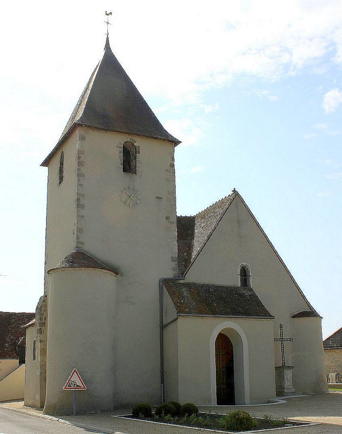 Château sur Allier église Saint Maurice